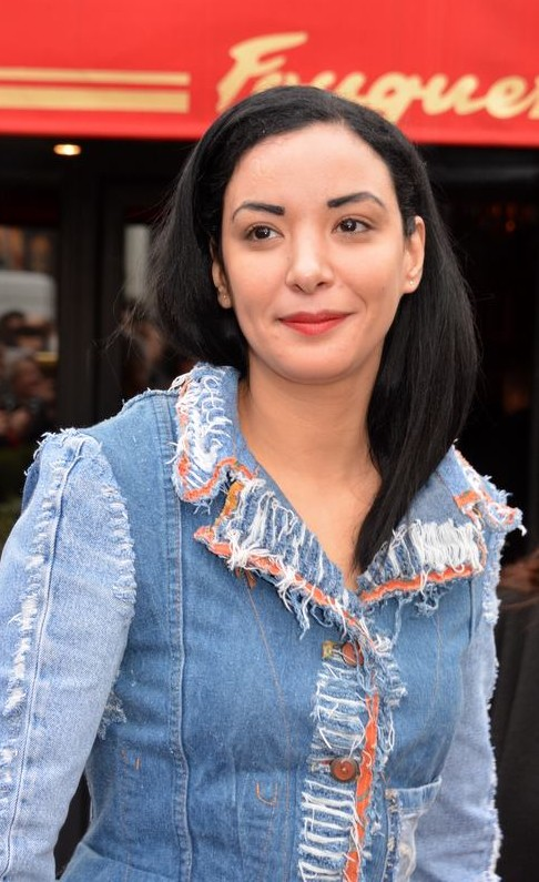 Loubna Abidar au déjeuner des nommés des César du cinéma